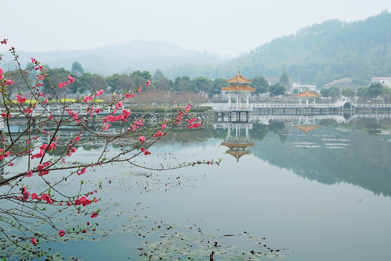 广州最美乡村—红山村